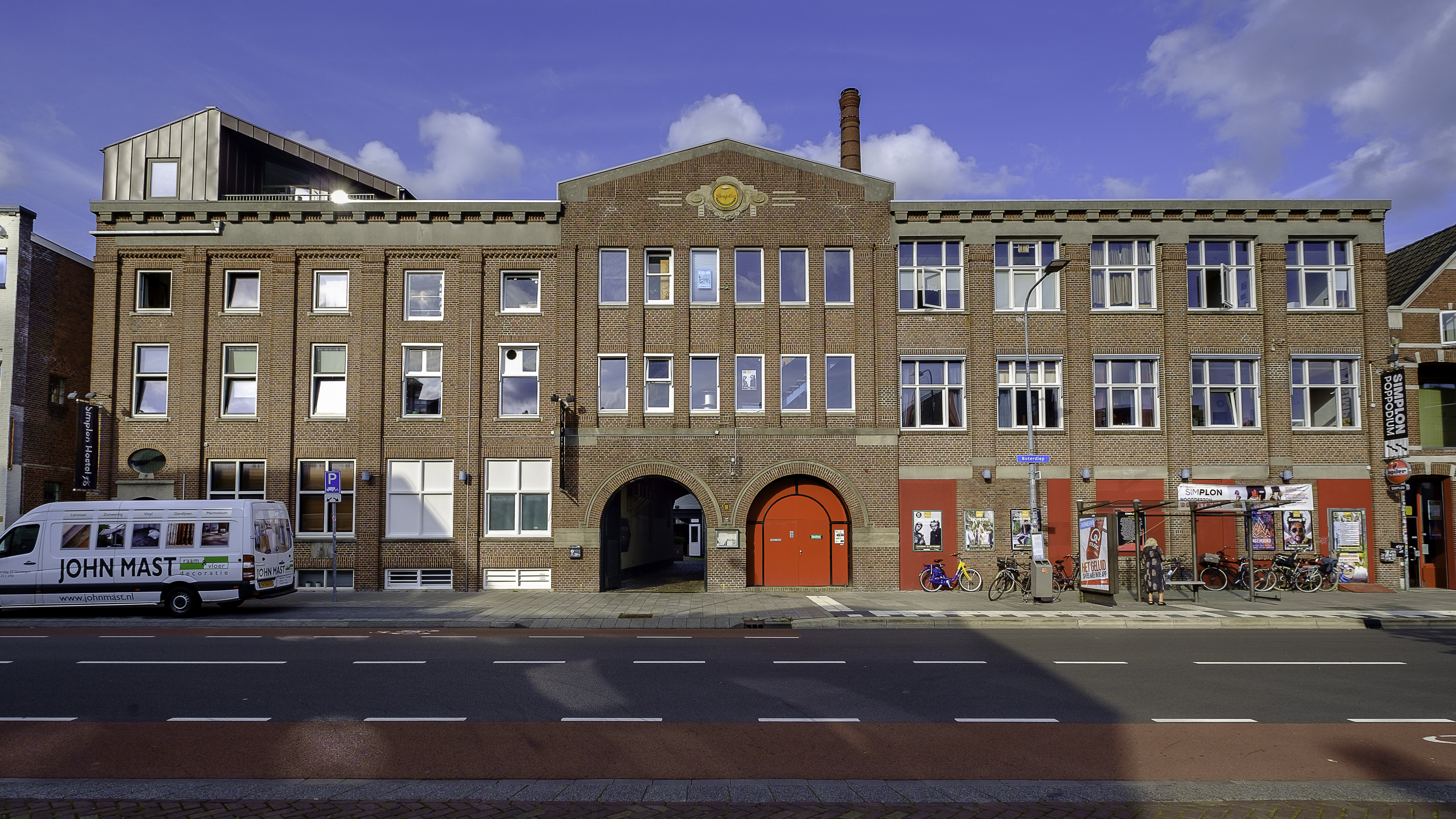 Vooraanzicht van de voormalige Gerzon’s Vleeschconservenfabriek, nu Simplon.